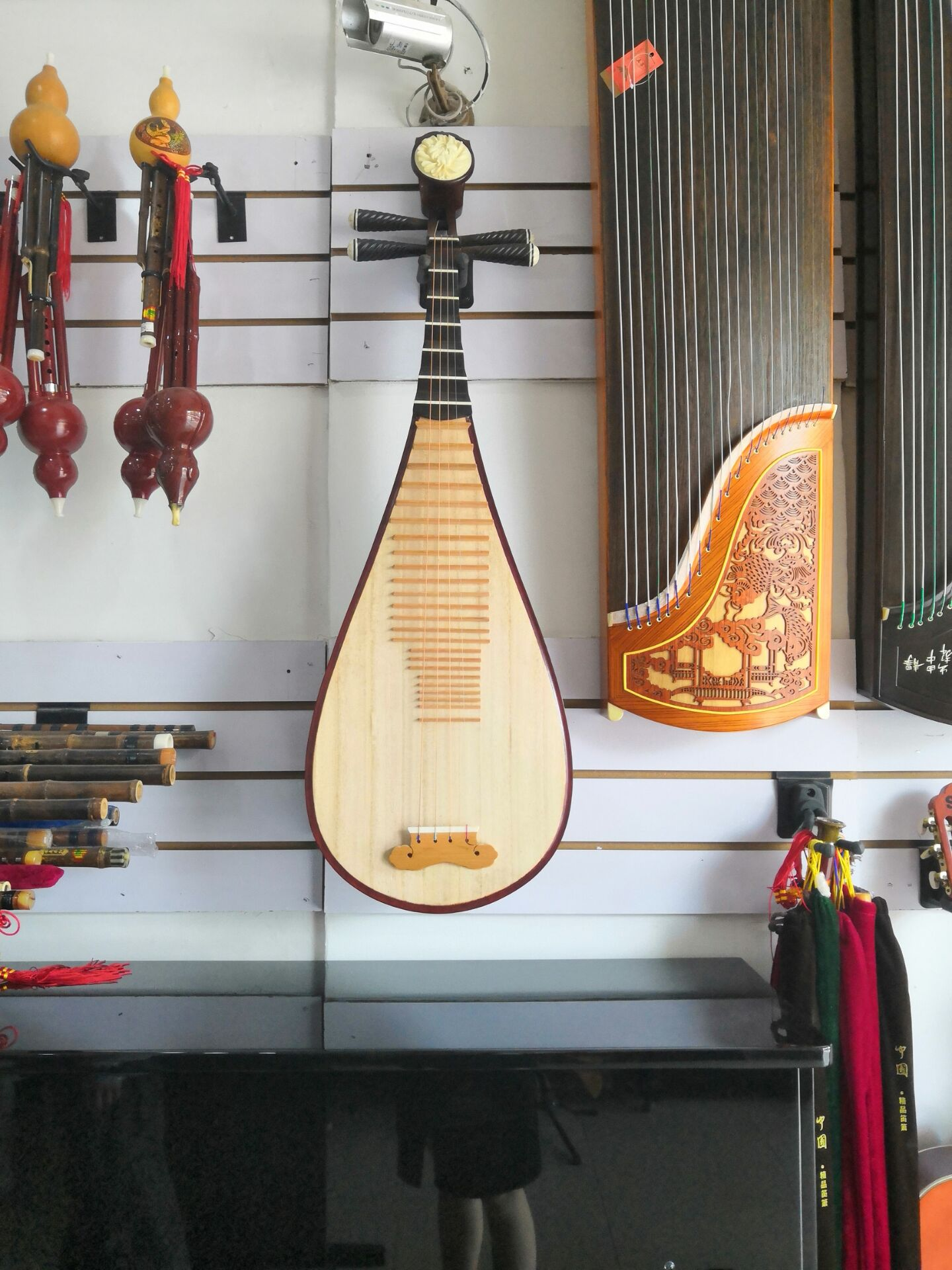 琵琶的照片